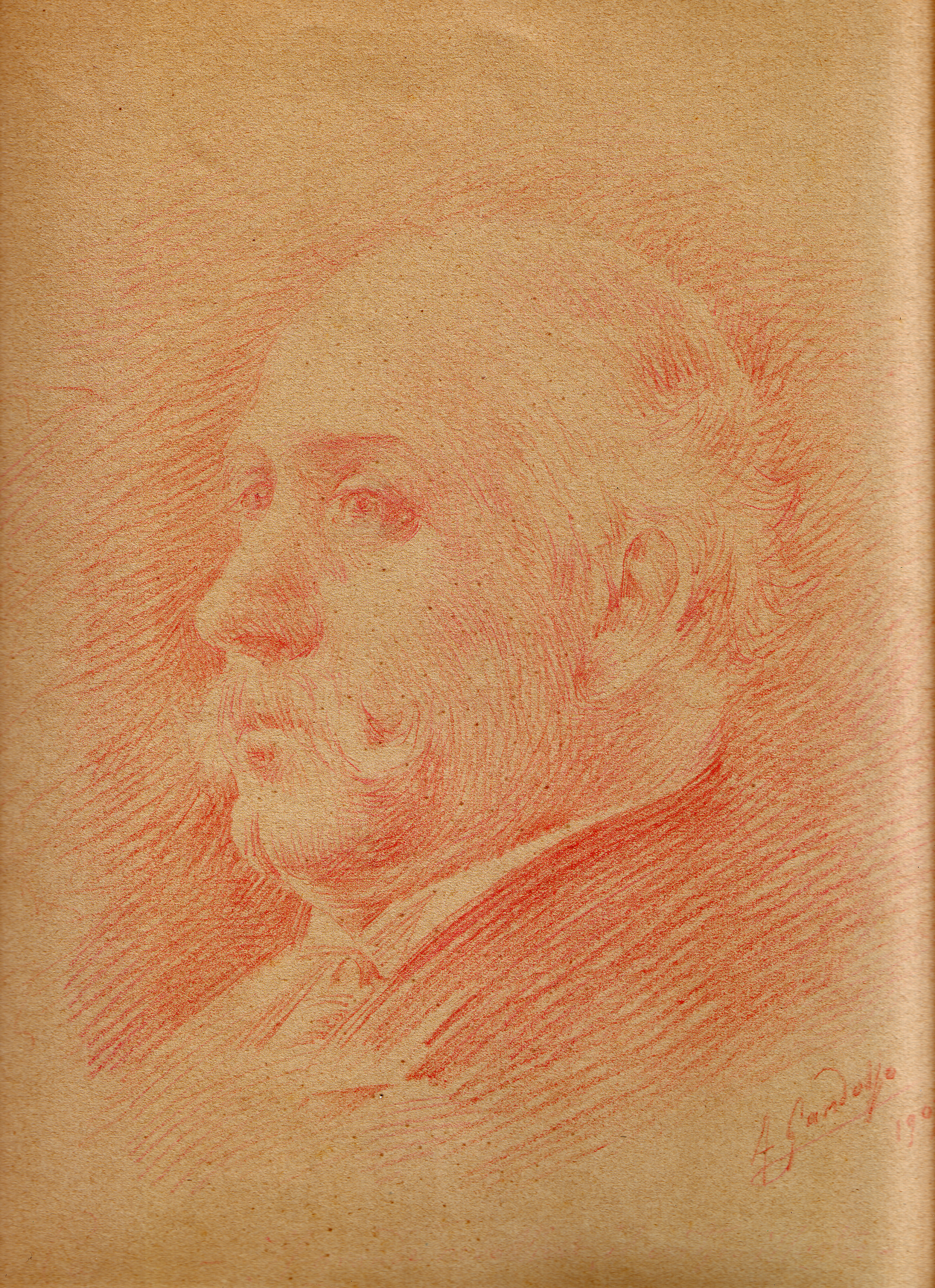 Riproduzione di un disegno di Antonino Gandolfo che ritrae Luigi Capuana